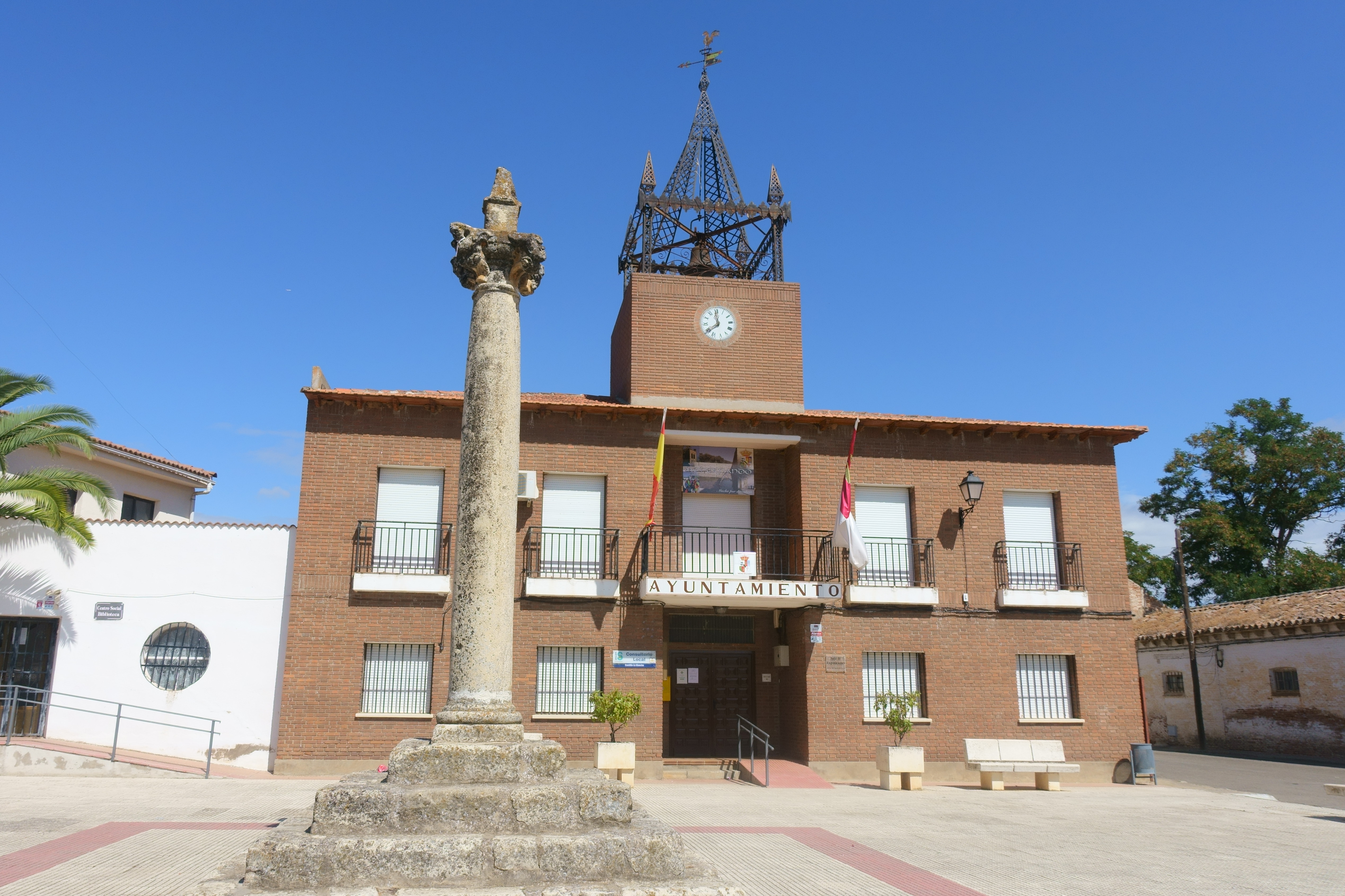 Casa consistorial de Mohernando (Guadalajara, España).